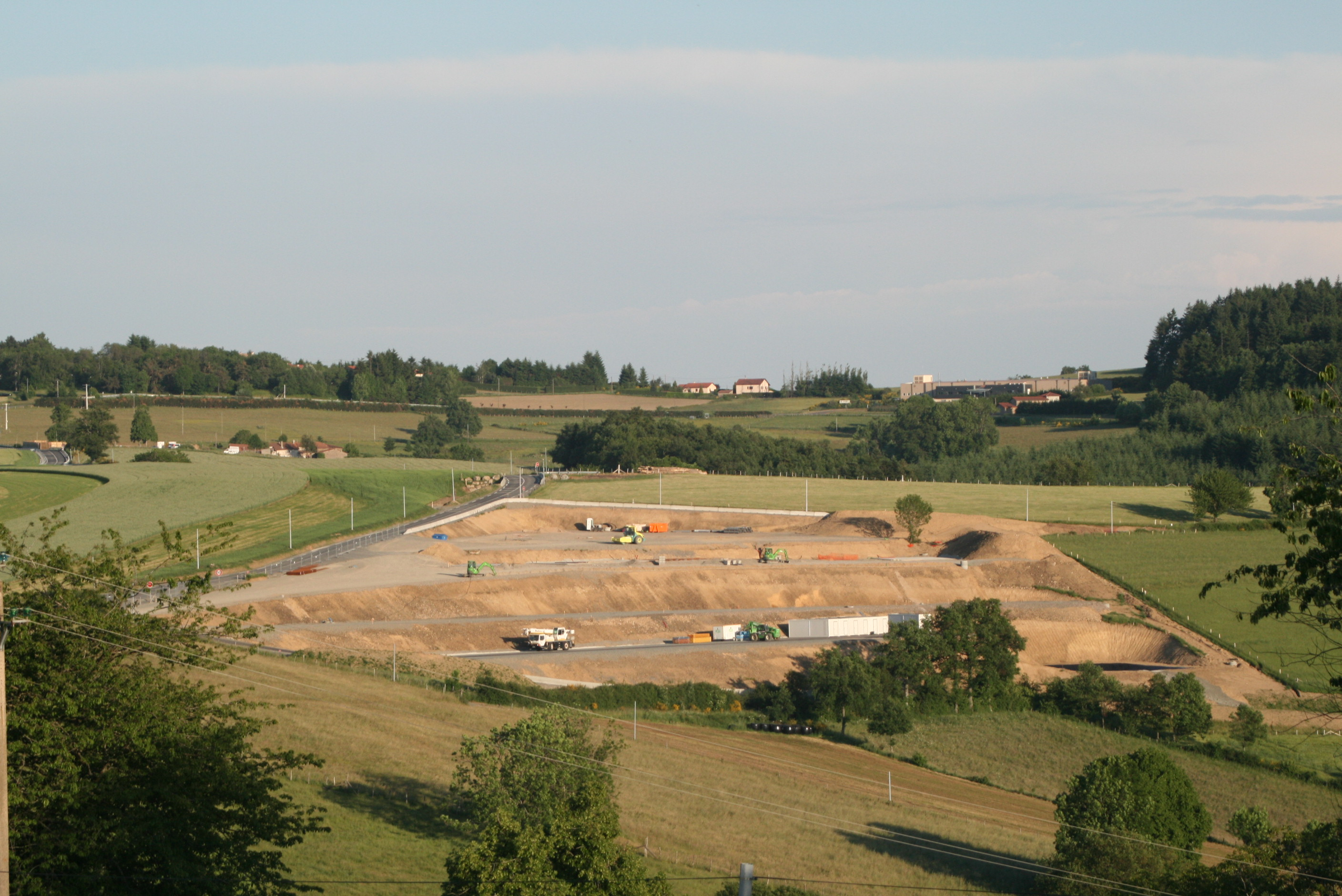 Terrassement du futur centre des travaux au dessus de l'entée ouest du tunnel